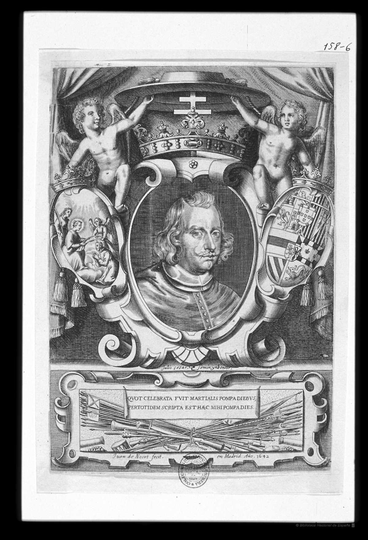 Aguafuerte en páginas preliminares de la obra de José González de Varela, Pyra religiosa, mausoleo sacro, pompas fúnebres... a las cenizas del Smo. Sr. cardenal-infante don Fernando de Austria, en Madrid, por Diego Díaz de la Carrera, 1642.